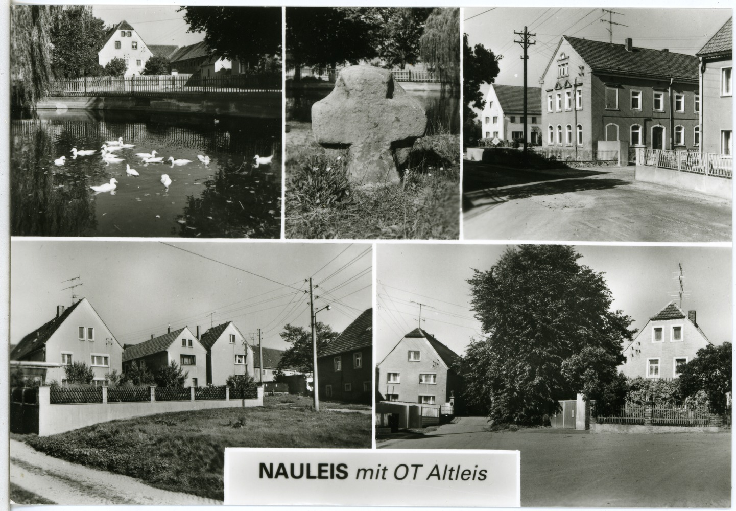 Nauleis; Wohnhäuser in Nauleis und Altleis This postcard is from publisher Brück & Sohn in Meißen ( postcard has a unique number 30755 and is available in a higher resolution at the publisher. This images was uploaded in a cooperation project between Wikipedians and the publisher.